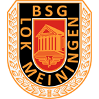 Historisches Logo der Betriebssportgemeinschaft Lok Meiningen